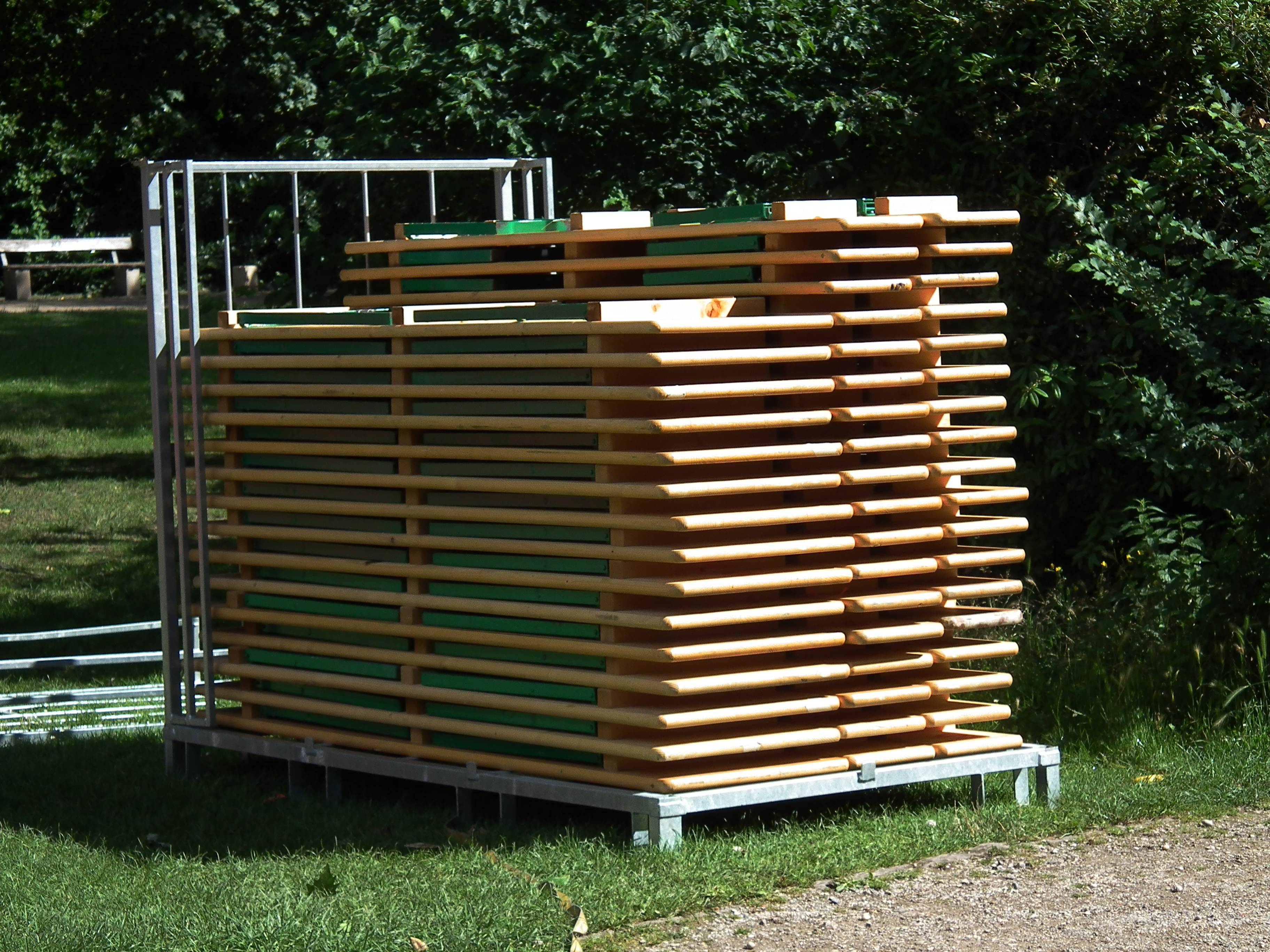 Gestapelte Biertische und -bänke